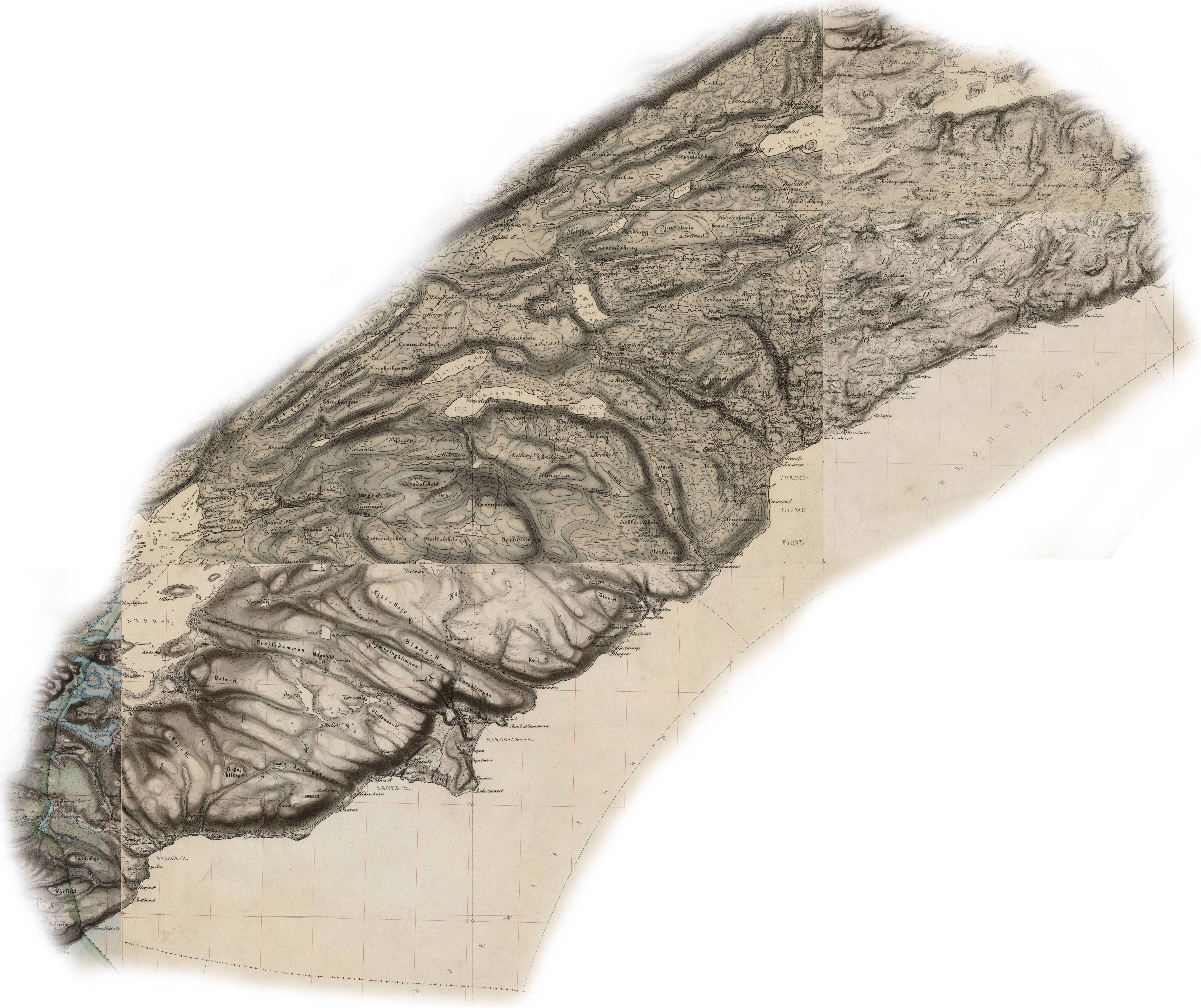 5 kartblader håndtegnet mellom 1866 og 1876, satt sammen til Leksvik Kommune. Kartet viser datidens gårder som var i drift, setrer og veier.